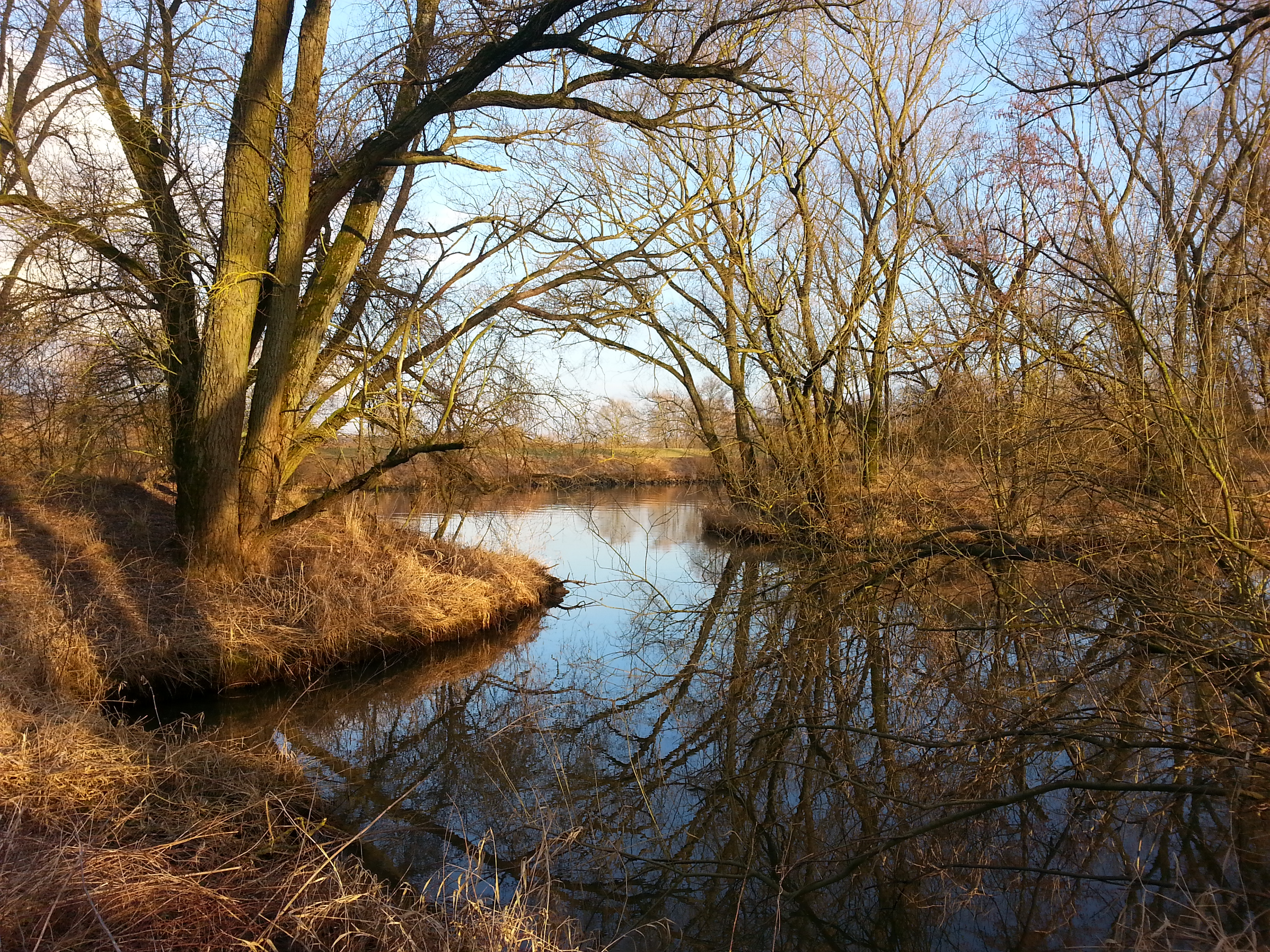 Naturschutzgebiet Altmain und Sandmagerrasen bei Limbach, Unterfranken